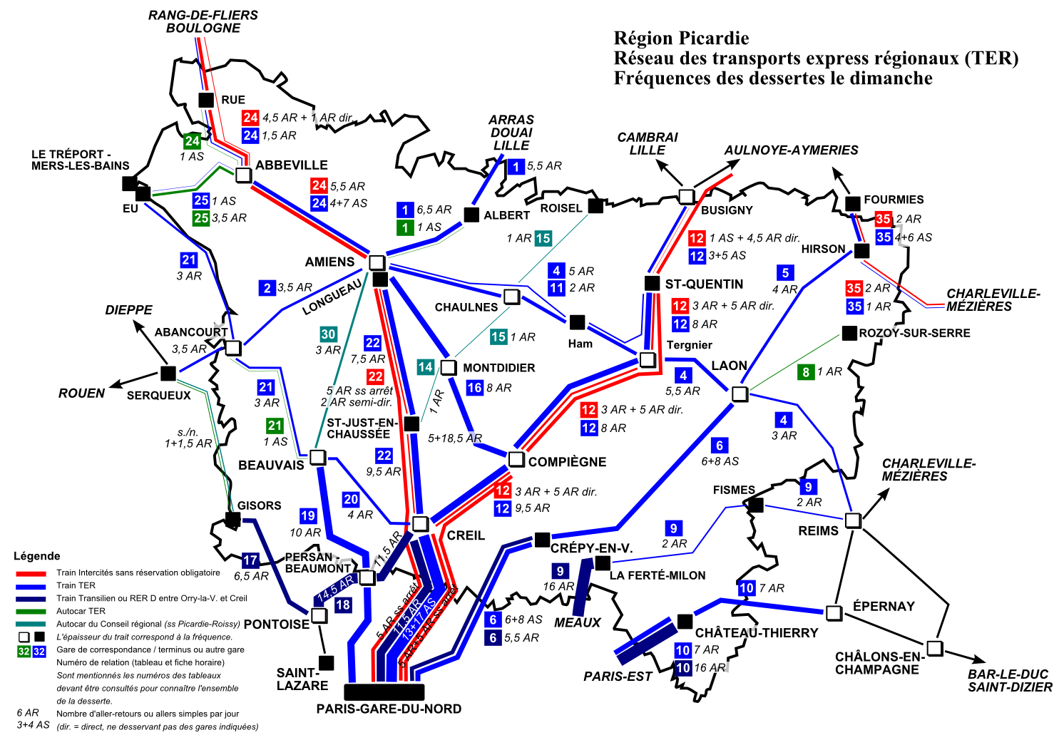 TER Picardie, fréquence de la desserte le dimanche, horaire annuel 2012.